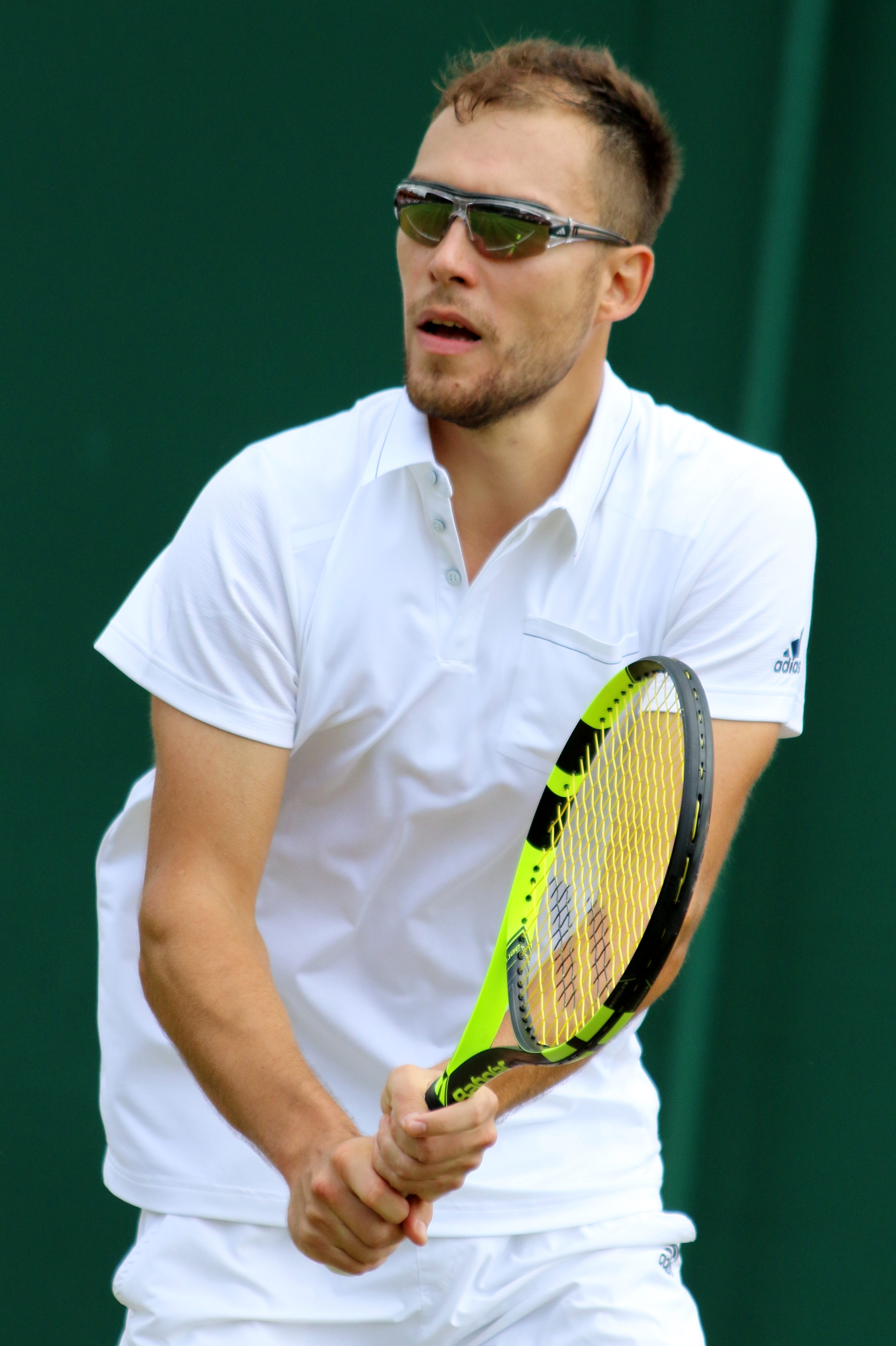 Janowicz WM17 (10)